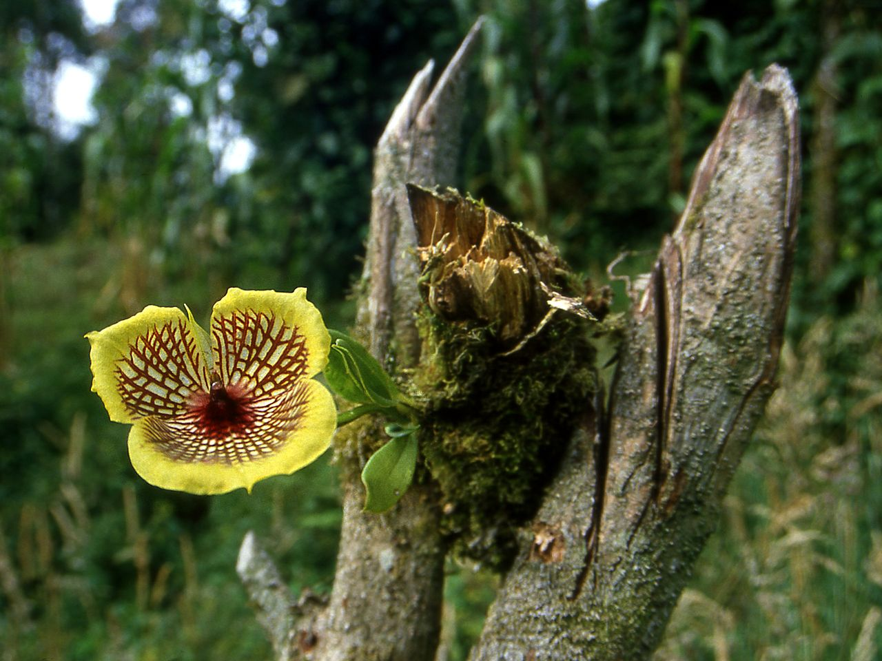 Telipogon hausmannianus